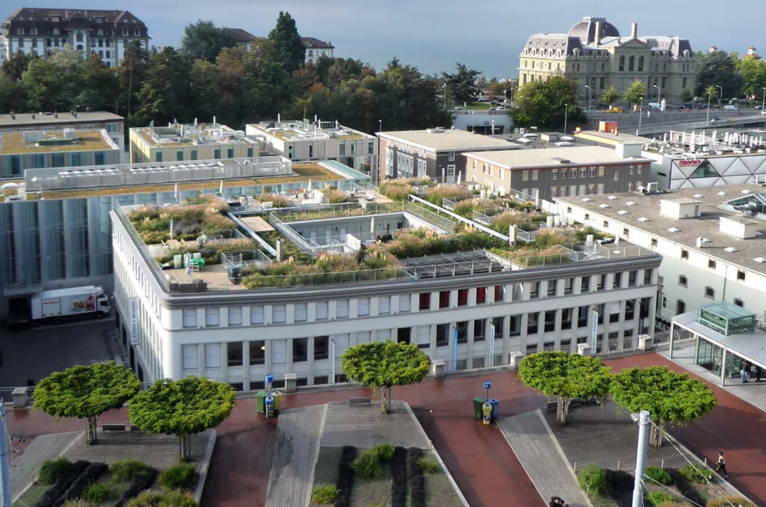 Bâtiment rénové de la rue de Genève 7, terrasses en toiture